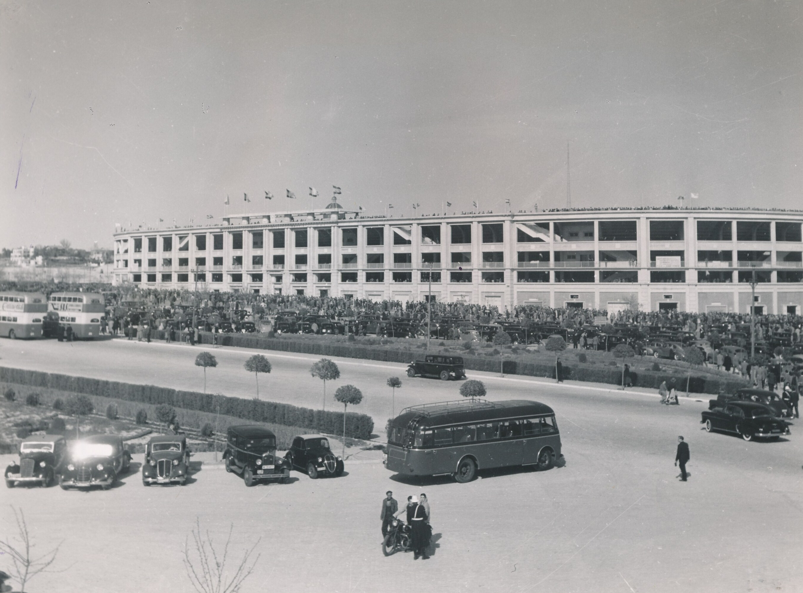 Madrid, 1951 Procedencia: Archivo Fotográfico de la Dirección General de Turismo (1951-1992) Fotógrafo: Lara Registro nº: 00046 Signatura: Caja 1 Fondos: Biblioteca de la Facultad de Empresa y Gestión Pública (Universidad de Zaragoza) Legado: Luis Fernández Fuster / E.S. Turismo Huesca